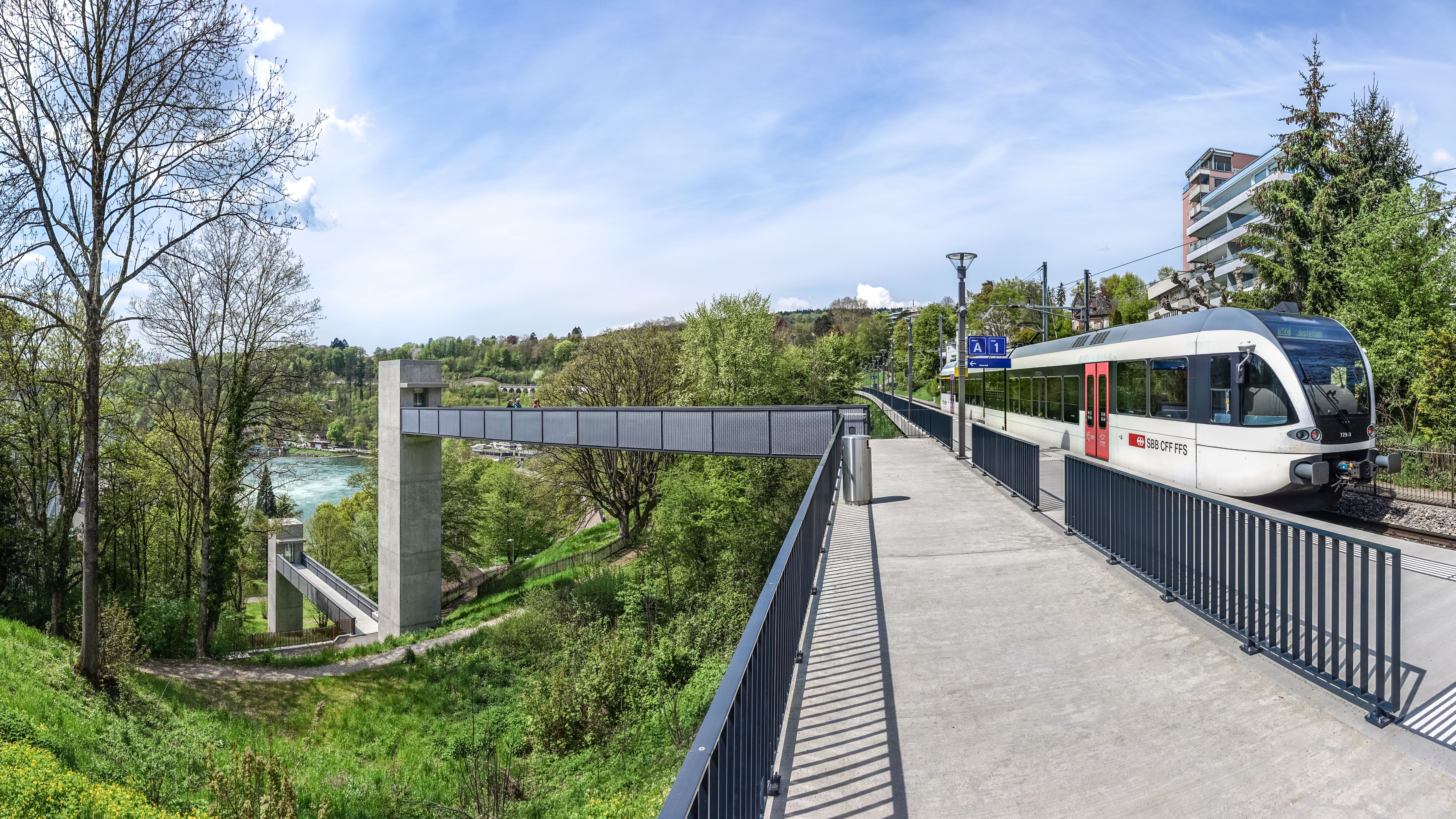 Bahnstation Neuhausen Rheinfall. Bahn Haltestelle mit Lift zum Rheinfall. Zwei Lifte verbinden die Bahnstation Neuhausen Rheinfall direkt für die Besichtigung des Rheinfalls. Rollstuhlgängig.